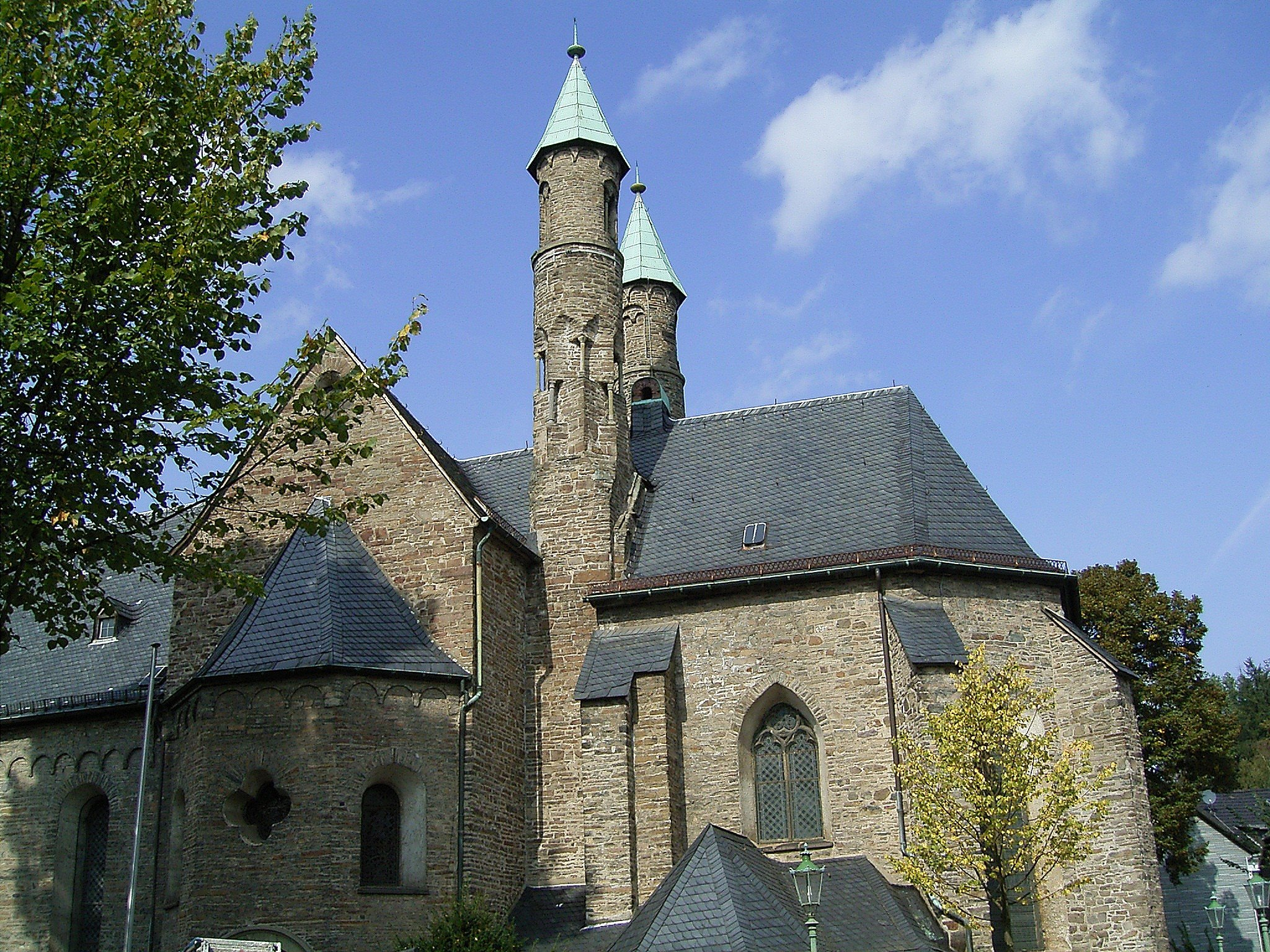 Plettenberg